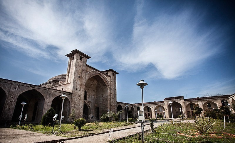 مازِرونی: فرح آباد ساری